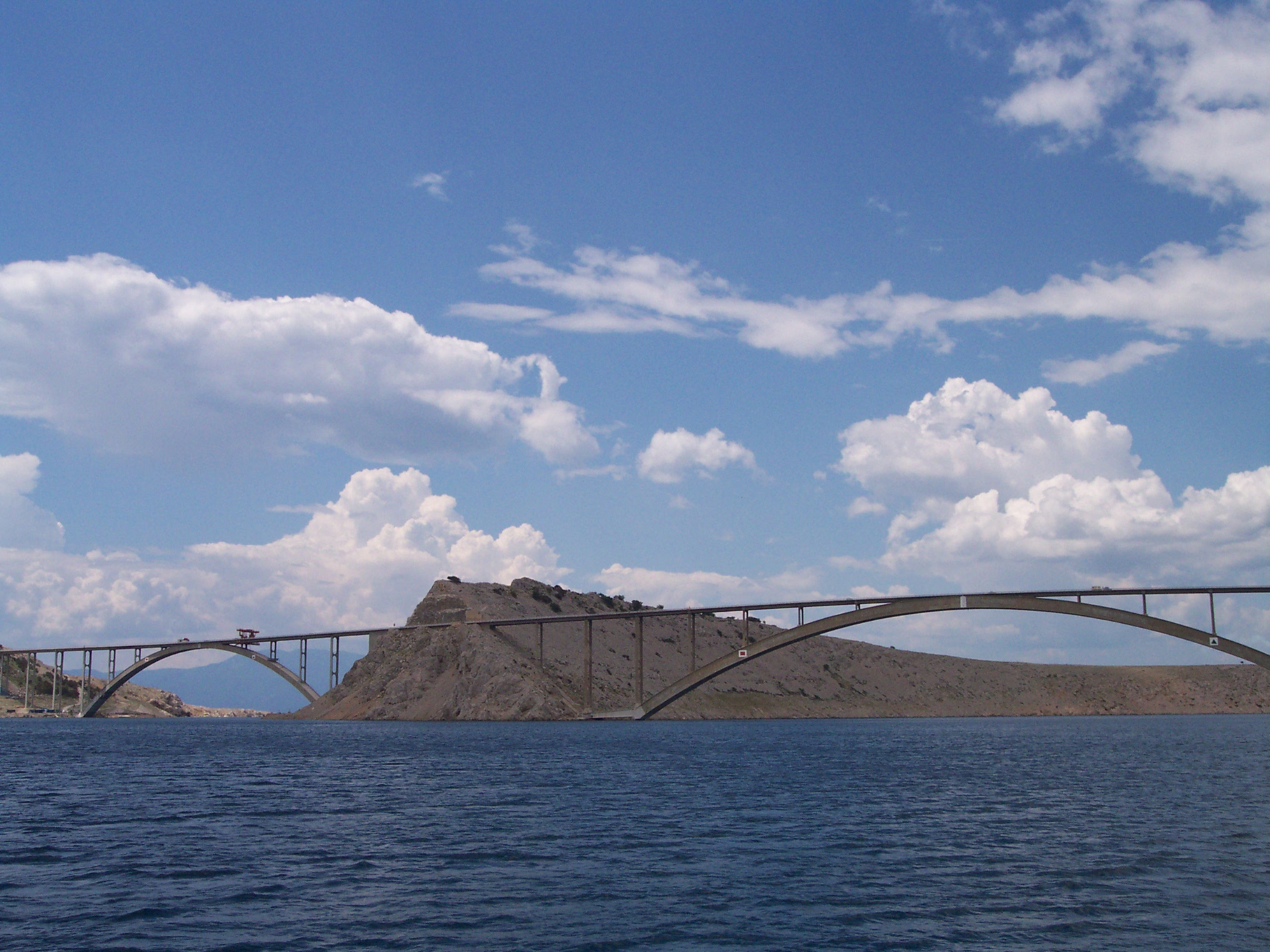 Diese Brücke verbindet die Insel Krk mit dem Festland.